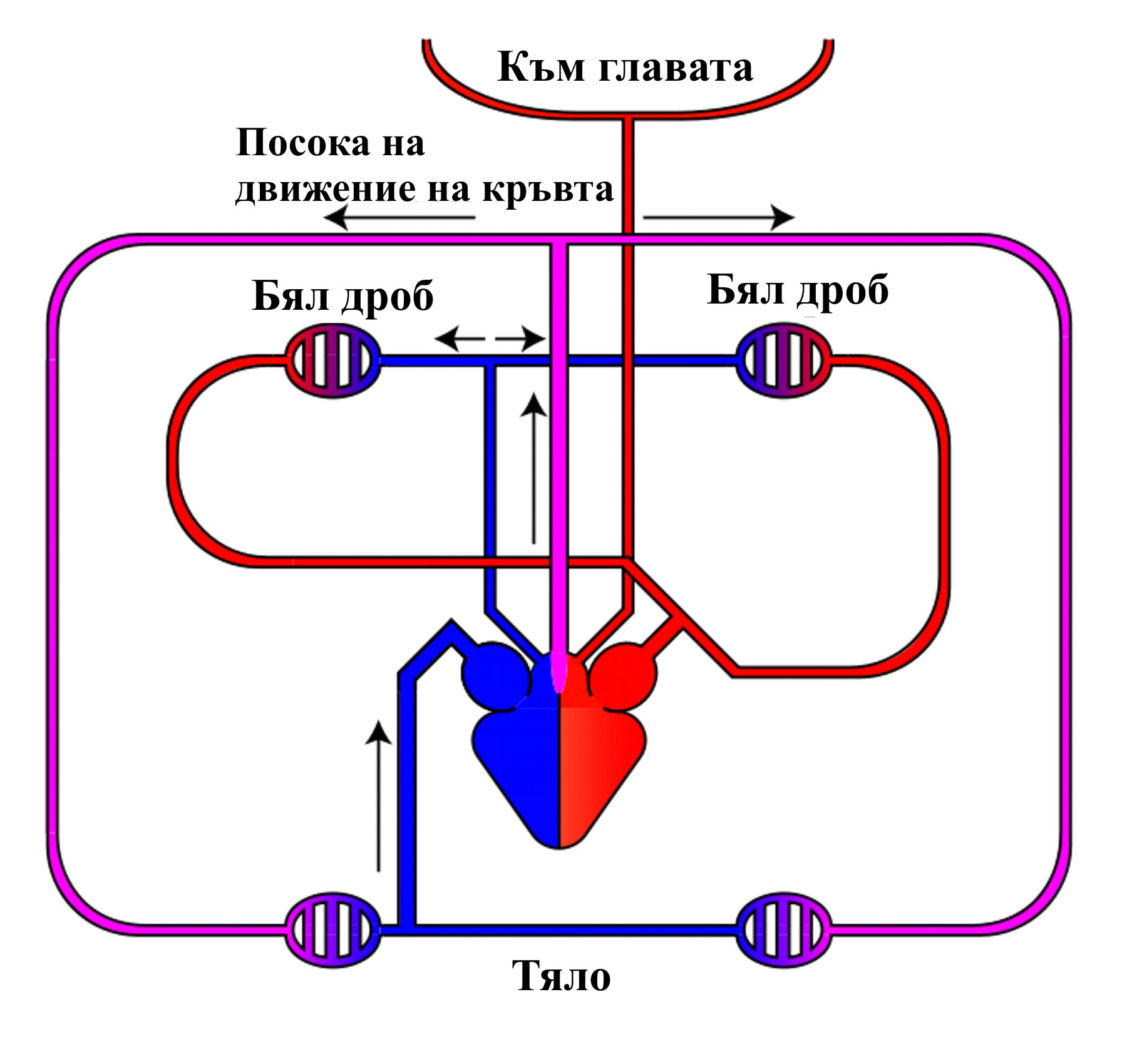 Опростено представяне на кръвоносната система при влечугите, червено обозначава окислената кръв, синьото - неокислената, а розовото - смесената. Изображението е съставено на Adobe Illustrator 10 от User:Lennert B на 26.11.05 под името Image:Blutkreislauf_Reptilien.svg и преведено на български от User:Azimski на 28.04.07